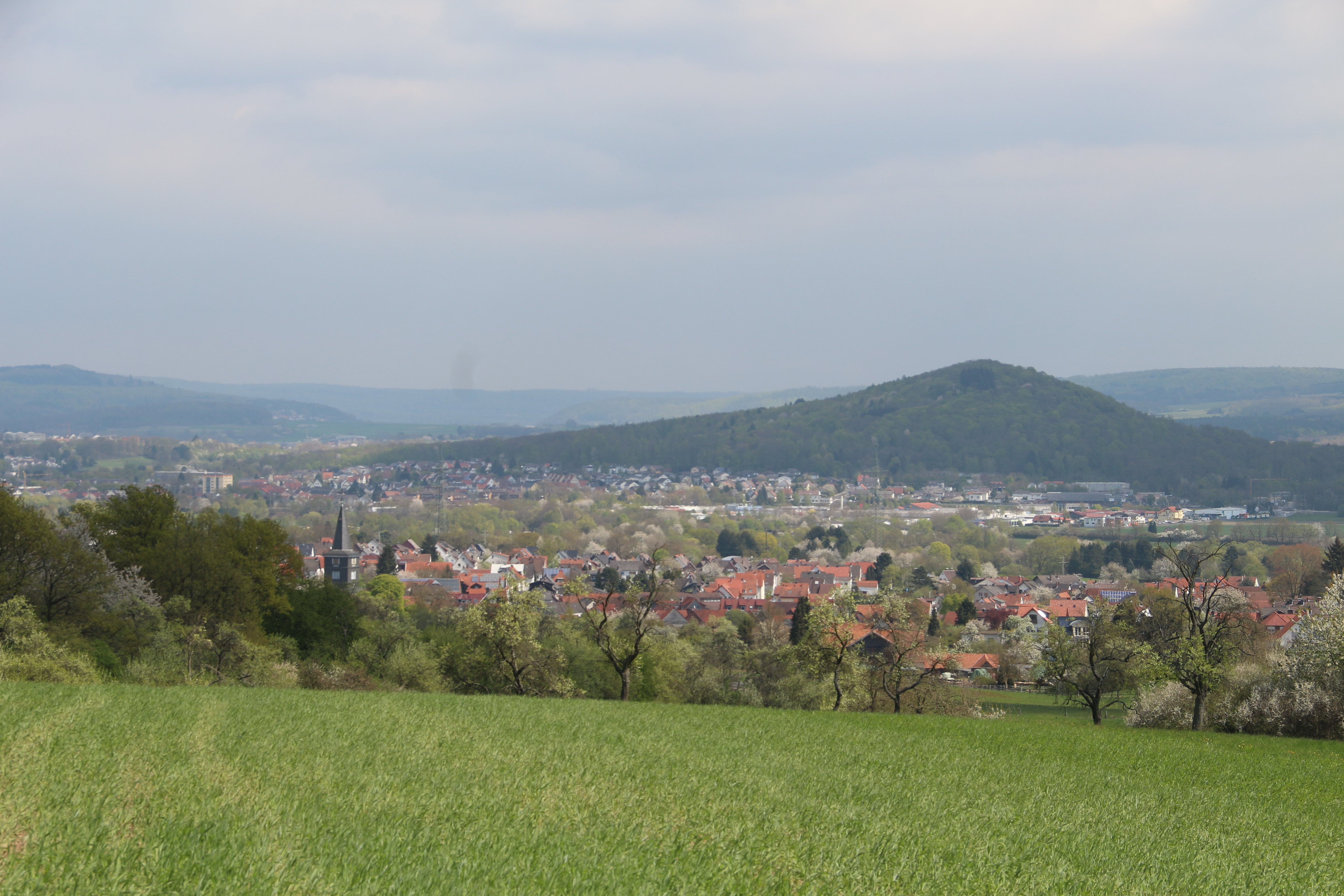 Wißmar in Obstwiesen und Lollarkopf mit Lollar jenseits der Lahnaue